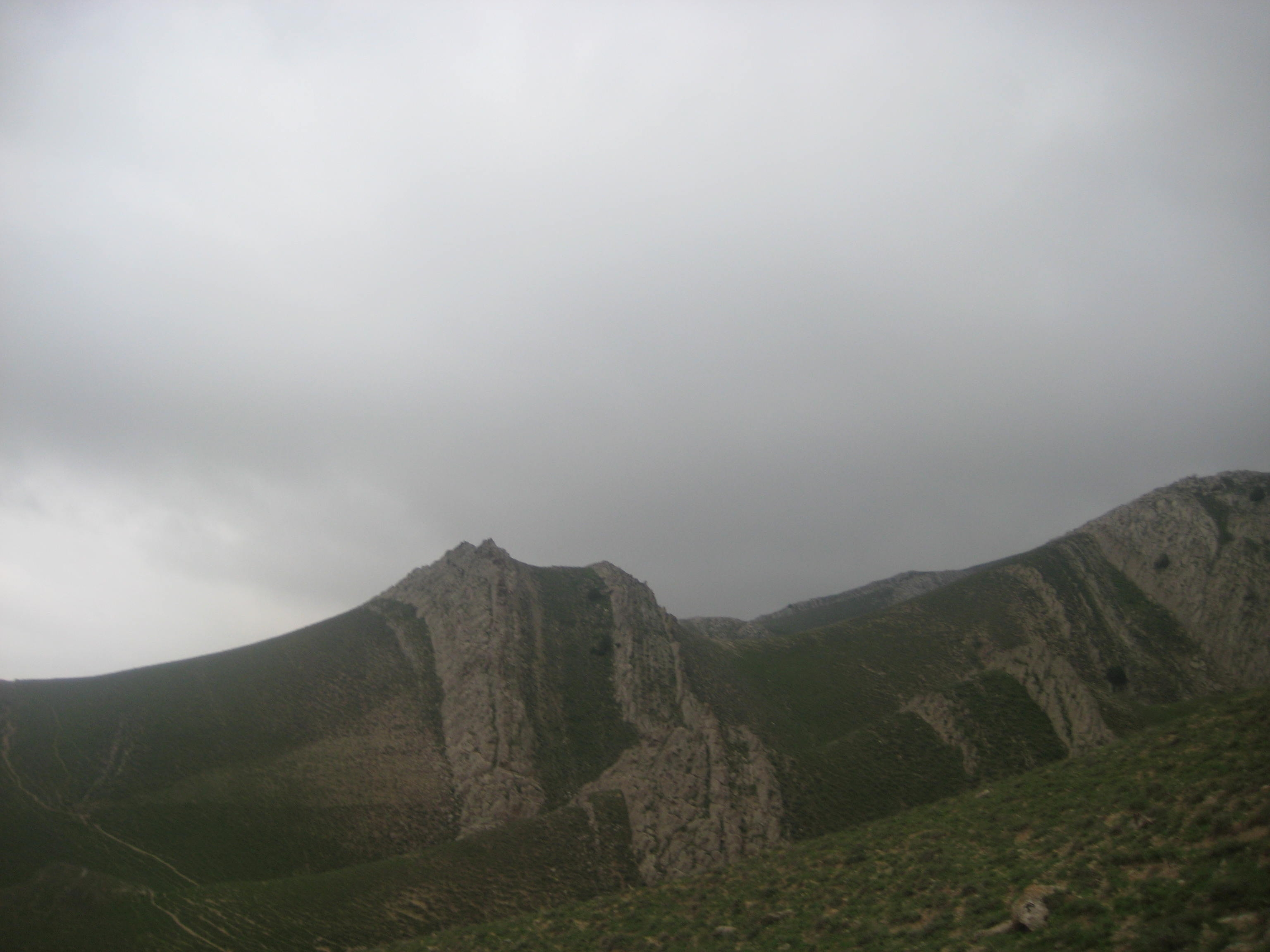 کوه های بزنگان